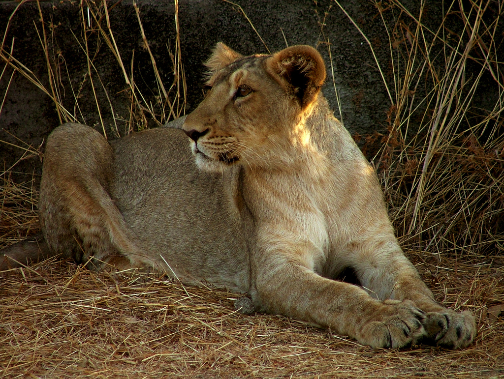 Her Highness